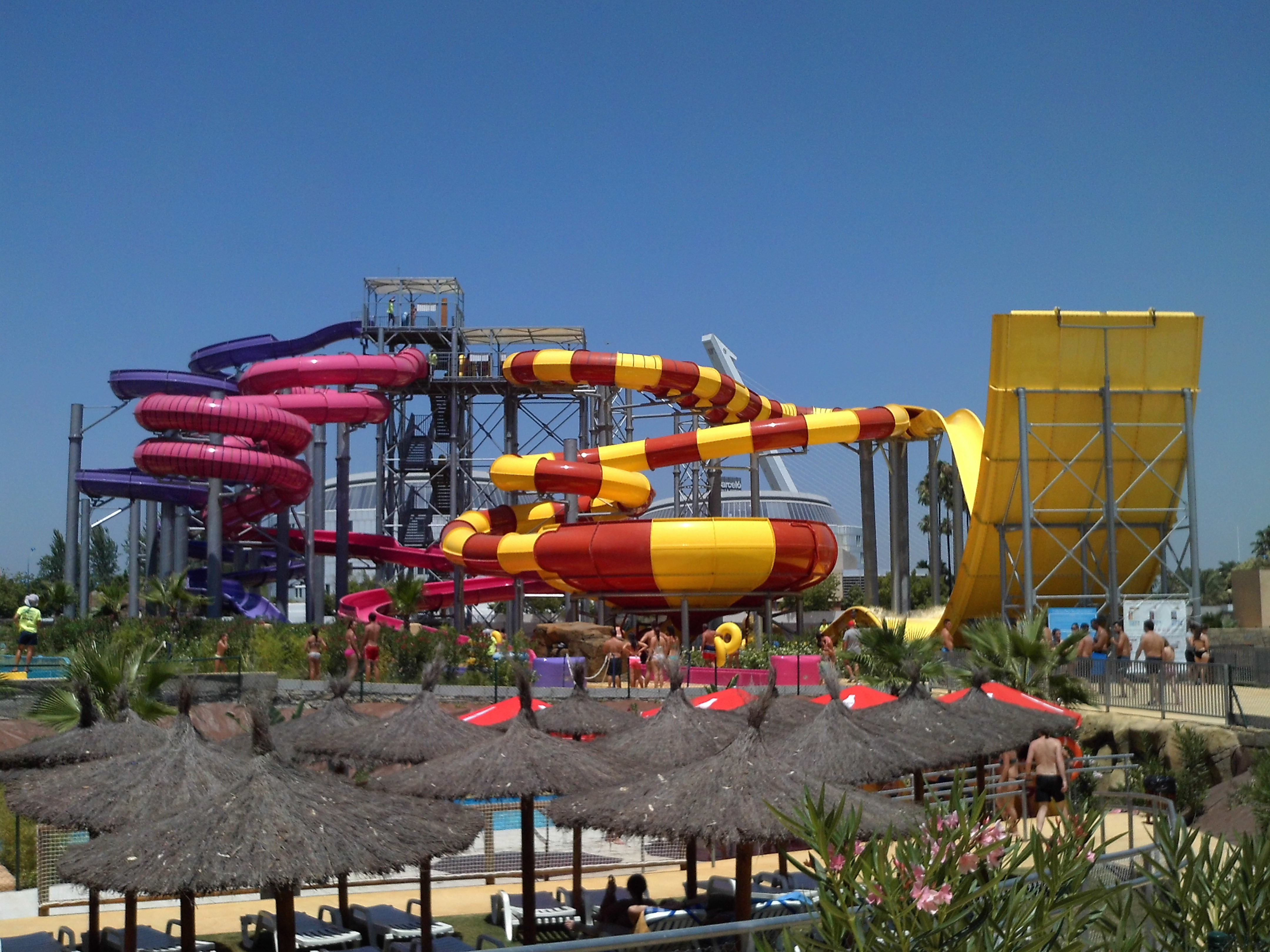 Agua Mágica es el nombre de una zona diseñada como parque acuático dentro del parque temático Isla Mágica. Sevilla, Andalucía, España.